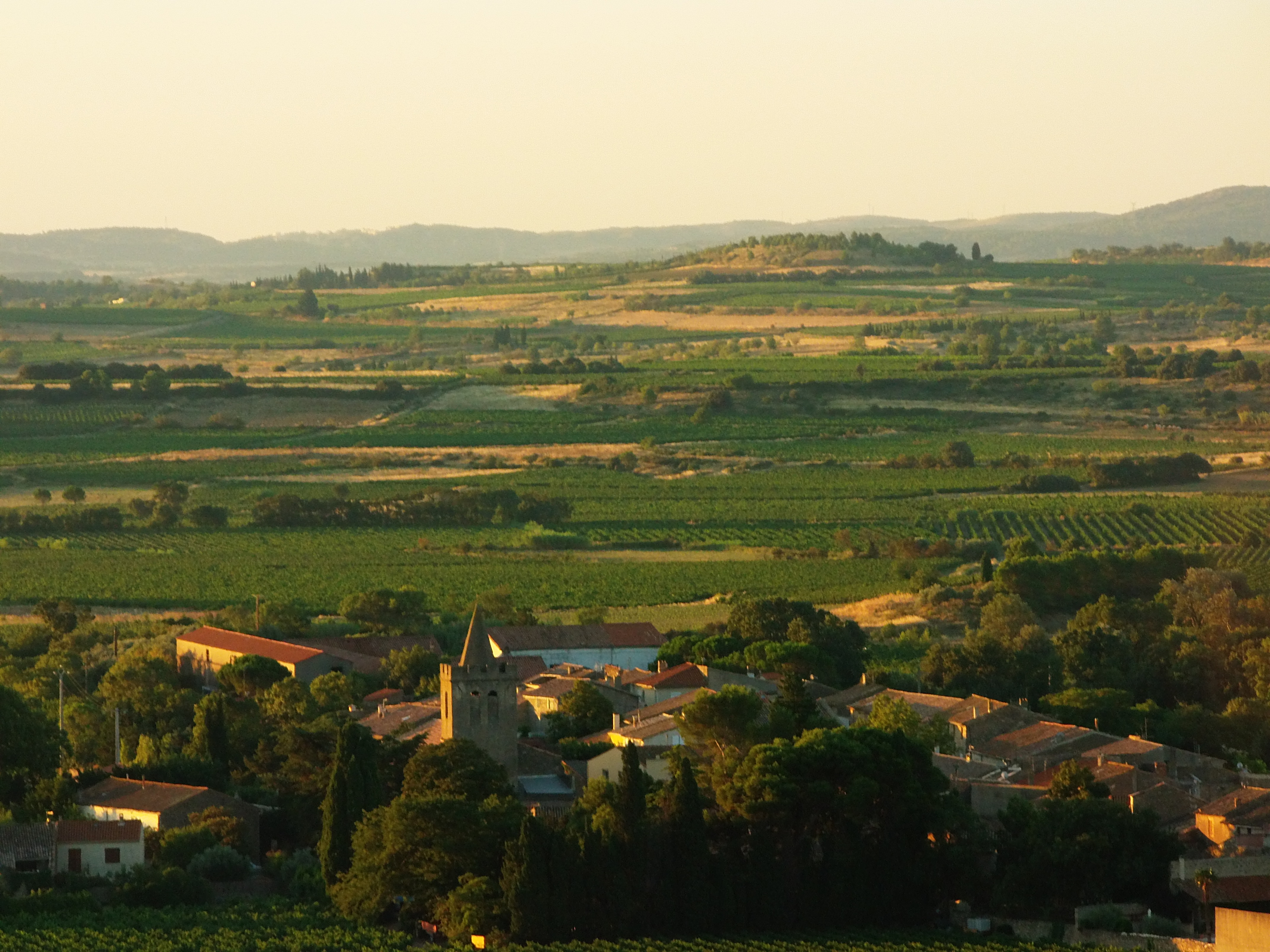 Plaine mailhacoise (Aude) vue du de la colline du Cayla (nord-nord-ouest). Au fond, la chaîne des Corbières.